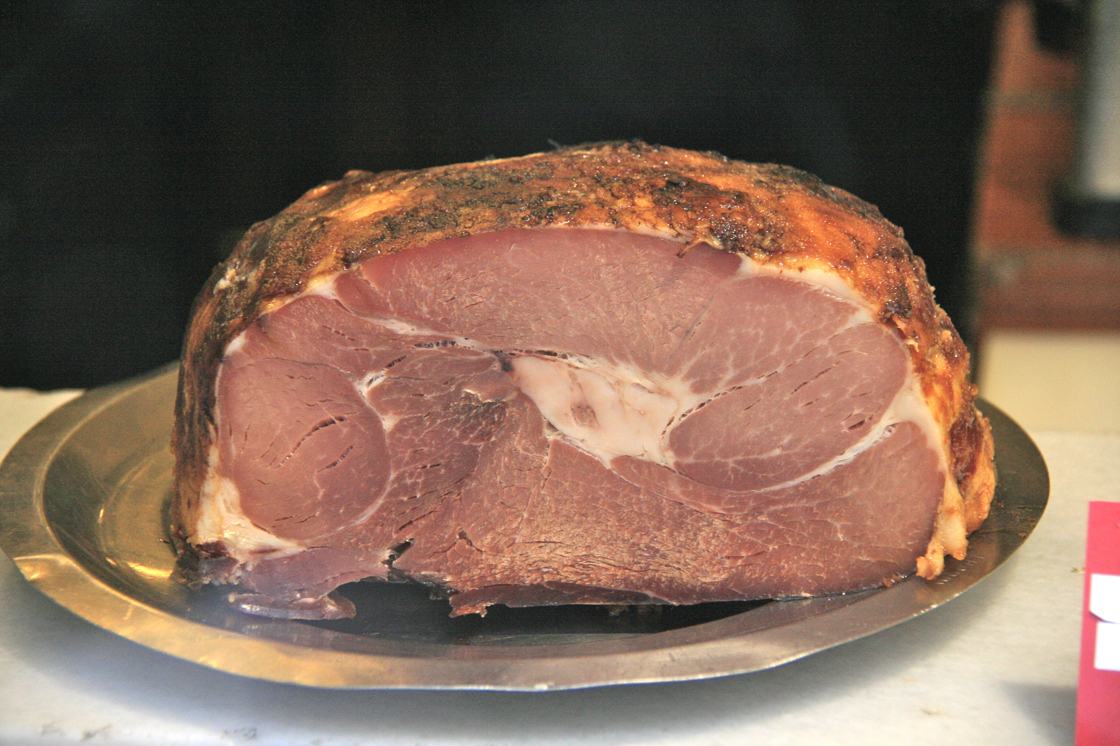 Fiambre de Cerdo